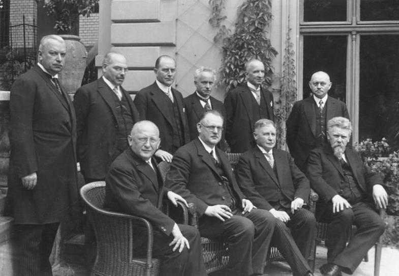 Berlin, Juni 1928 - Reichskabinett Müller-Franken. Sitzend von links nach rechts Reichsjustiz-Minister Koch-Weser; Reichskanzler Müller-Franken; Reichswehrminister General Groener; Reichsarbeits-Minister Wissell. Stehend v.l.n.r.: Reichsernährungsminister Dietrich/Baden; Reichsfinanzminister Dr. Hilferding; Reichswirtschafts-Minister Dr. Curtius; Reichsinnenminister Severing; Reichsverkehrsminister von Guerard ; Reichspostminister Schätzel. Information added by Wikimedia users.Kabinett Hermann Müller II 28. Juni 1928 – 27. März 1930